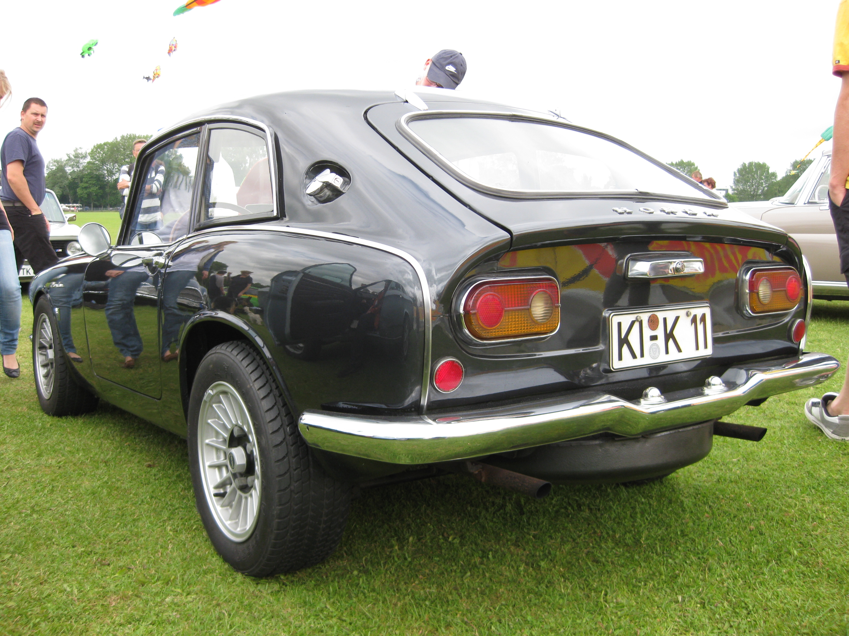 Honda S800 Heckansicht